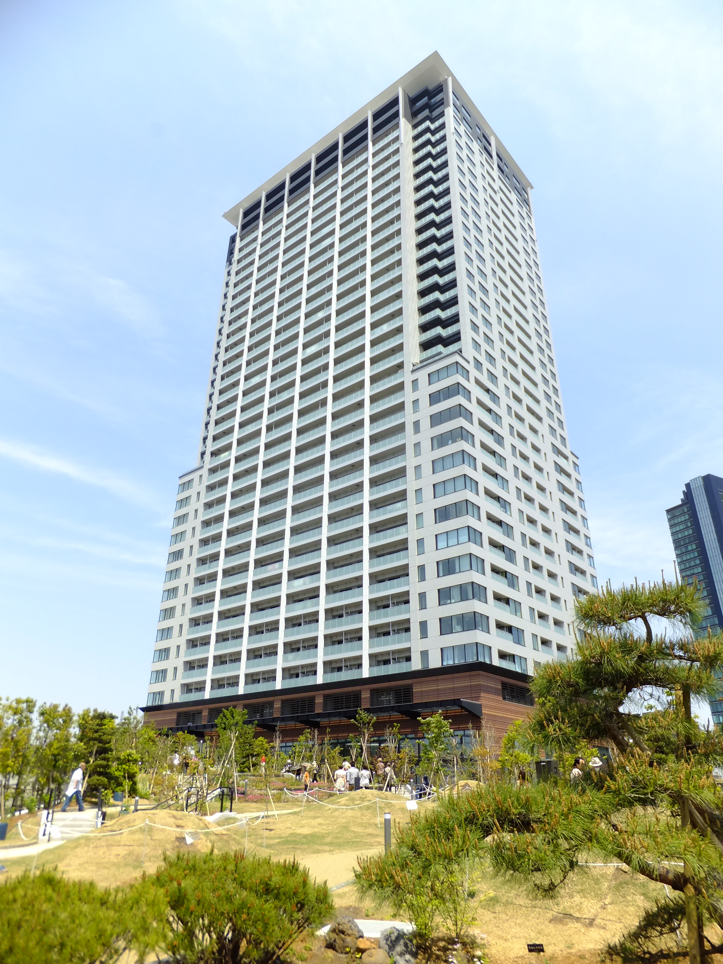 クロスエアタワー。大橋ジャンクション建設とともに再開発された区域、「O-Path目黒大橋」のタワーマンションであり、目黒区立大橋図書館などの公共施設も入居している。9階で目黒空中庭園と接続している。